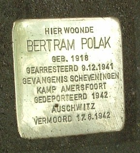 Stolperstein voor Bertram Polak, Professor Dondersstraat, Tilburg